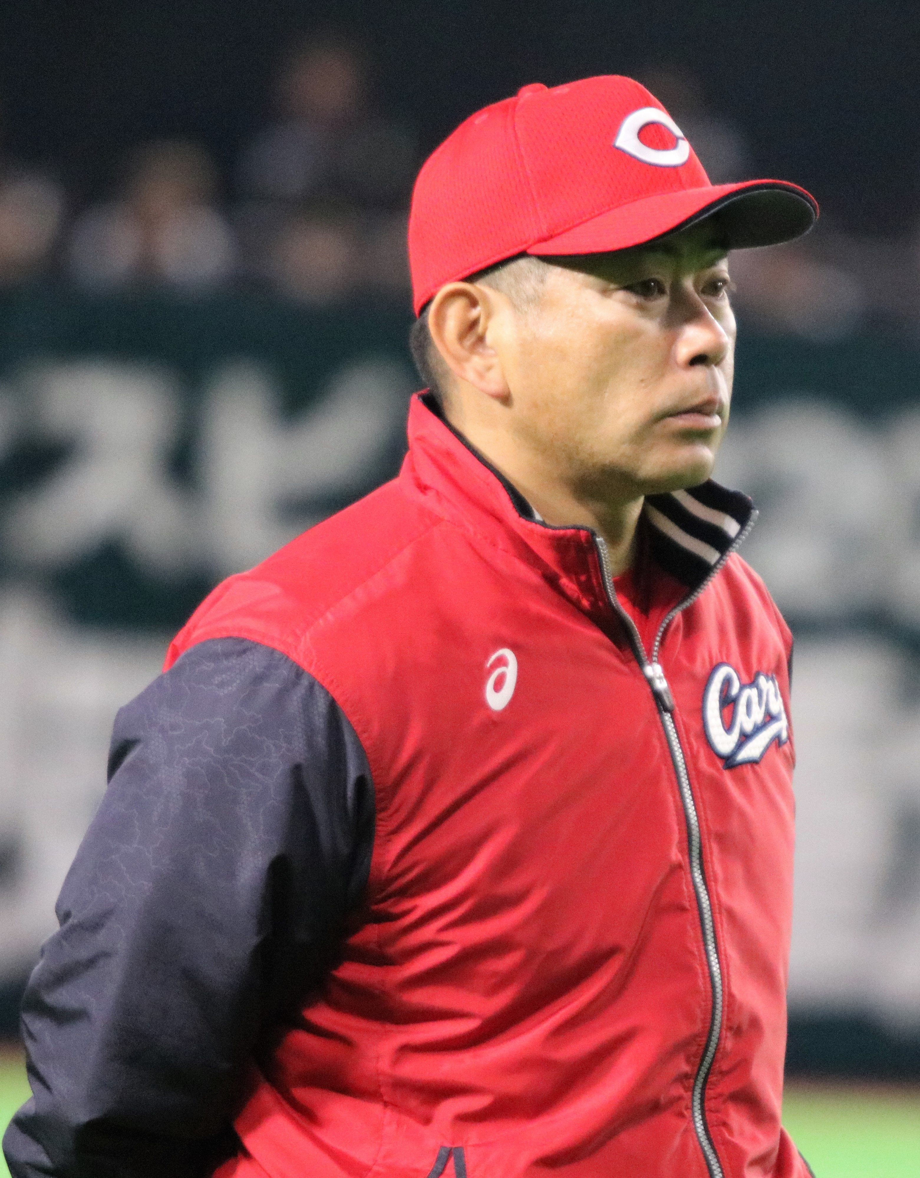 2018年3月23日福岡ソフトバンクホークス戦